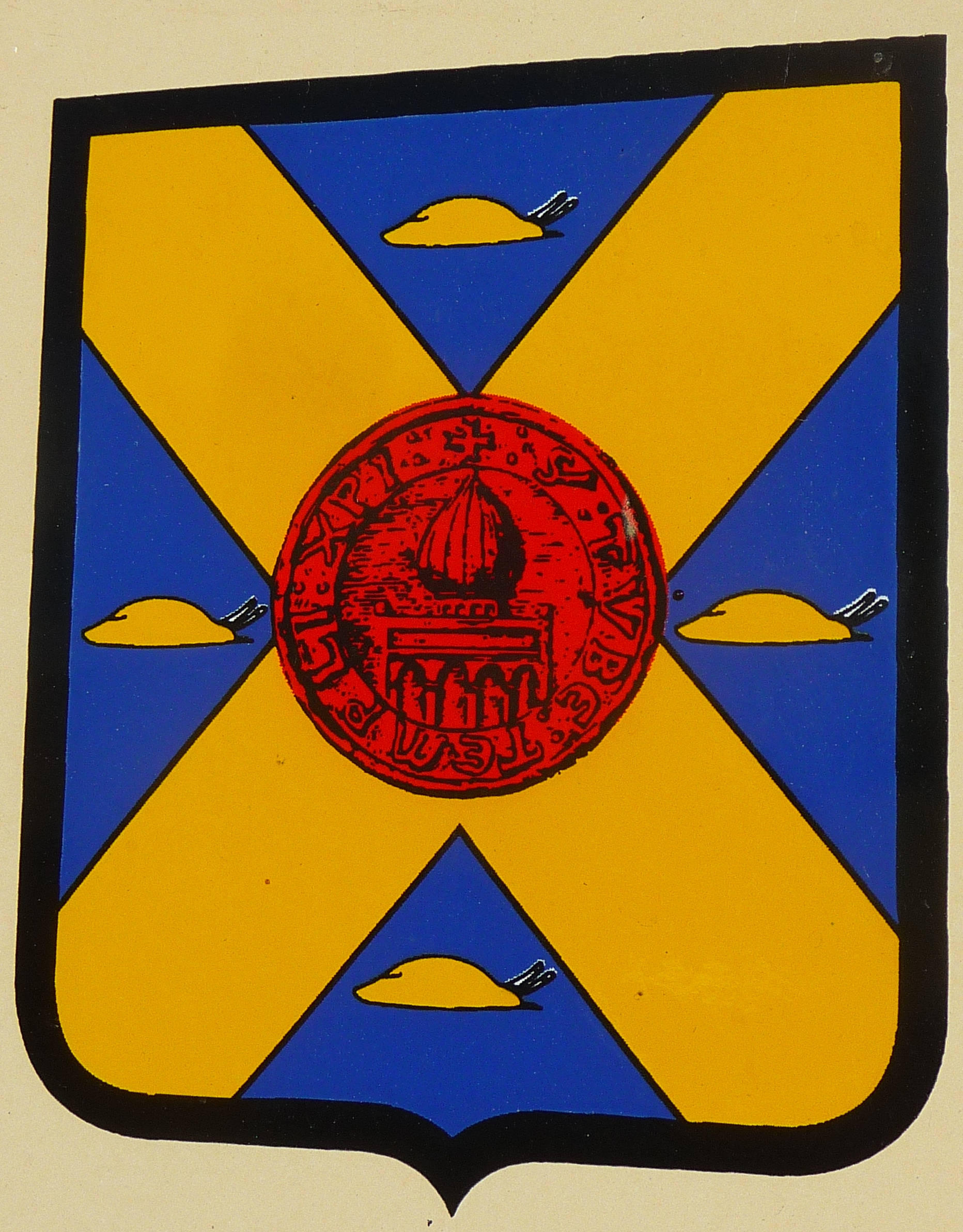 Blason de la commune de Molay France